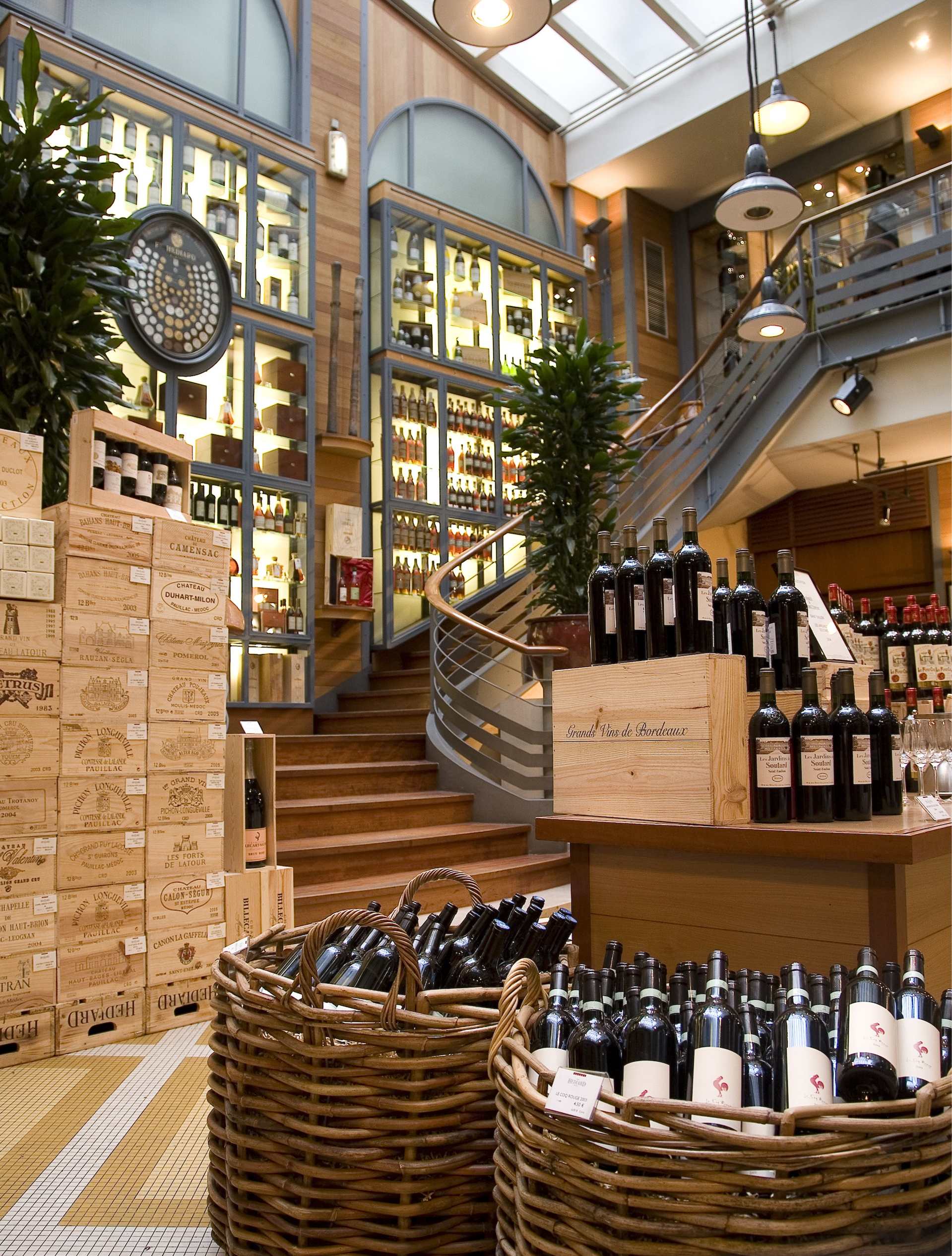 Vue de l'intérieur de la boutique de La Madeleine, 21, place de la Madeleine, Paris.